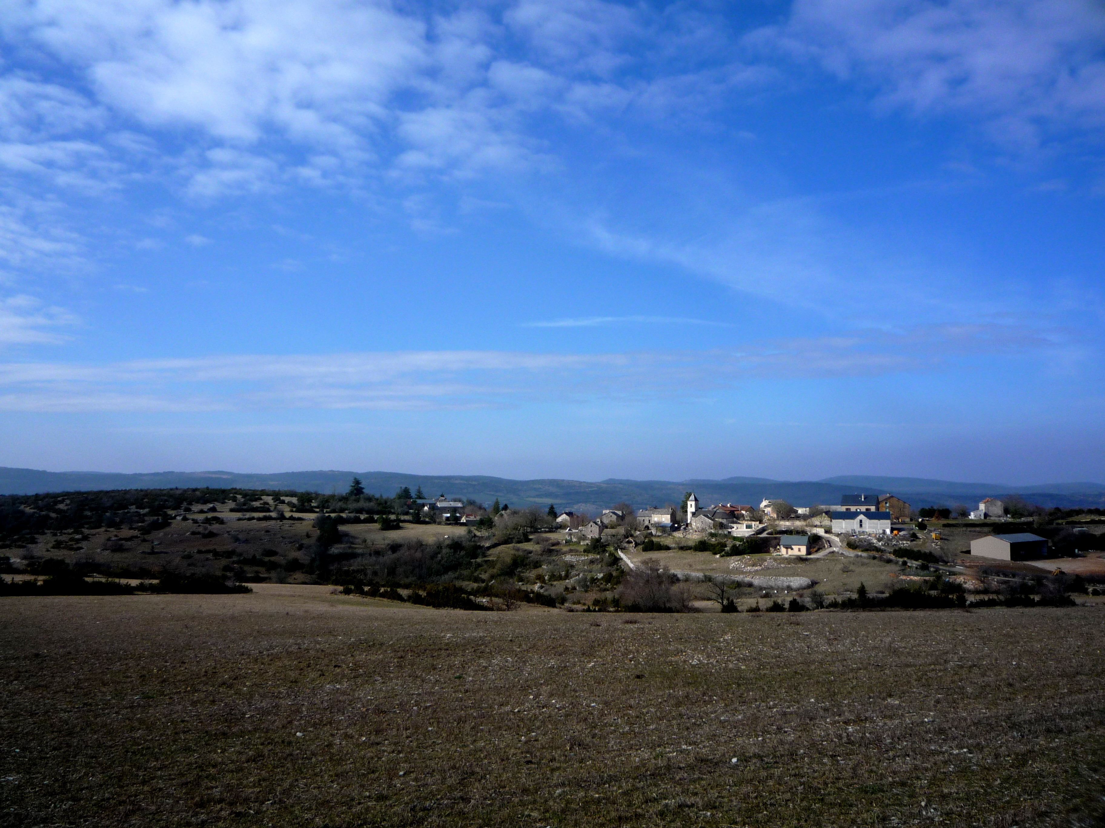 Revens